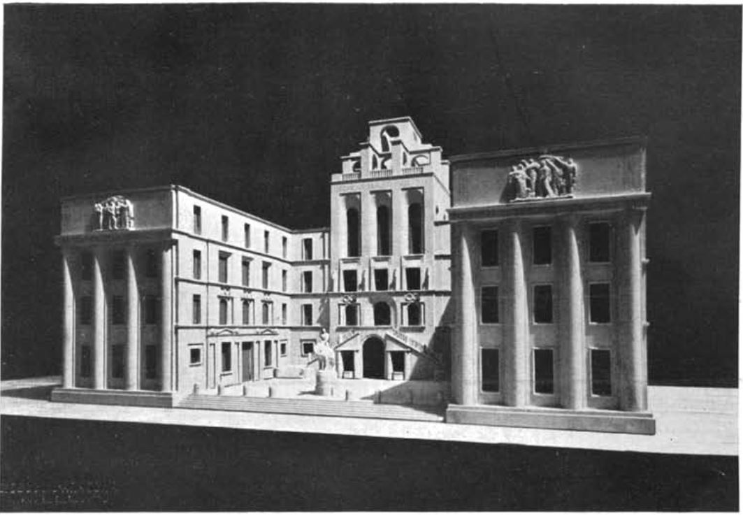 Modello della costruzione della Casa dei Sindacati, Milano, 1930. Archittetti Bordoni, Caneva, Carminati